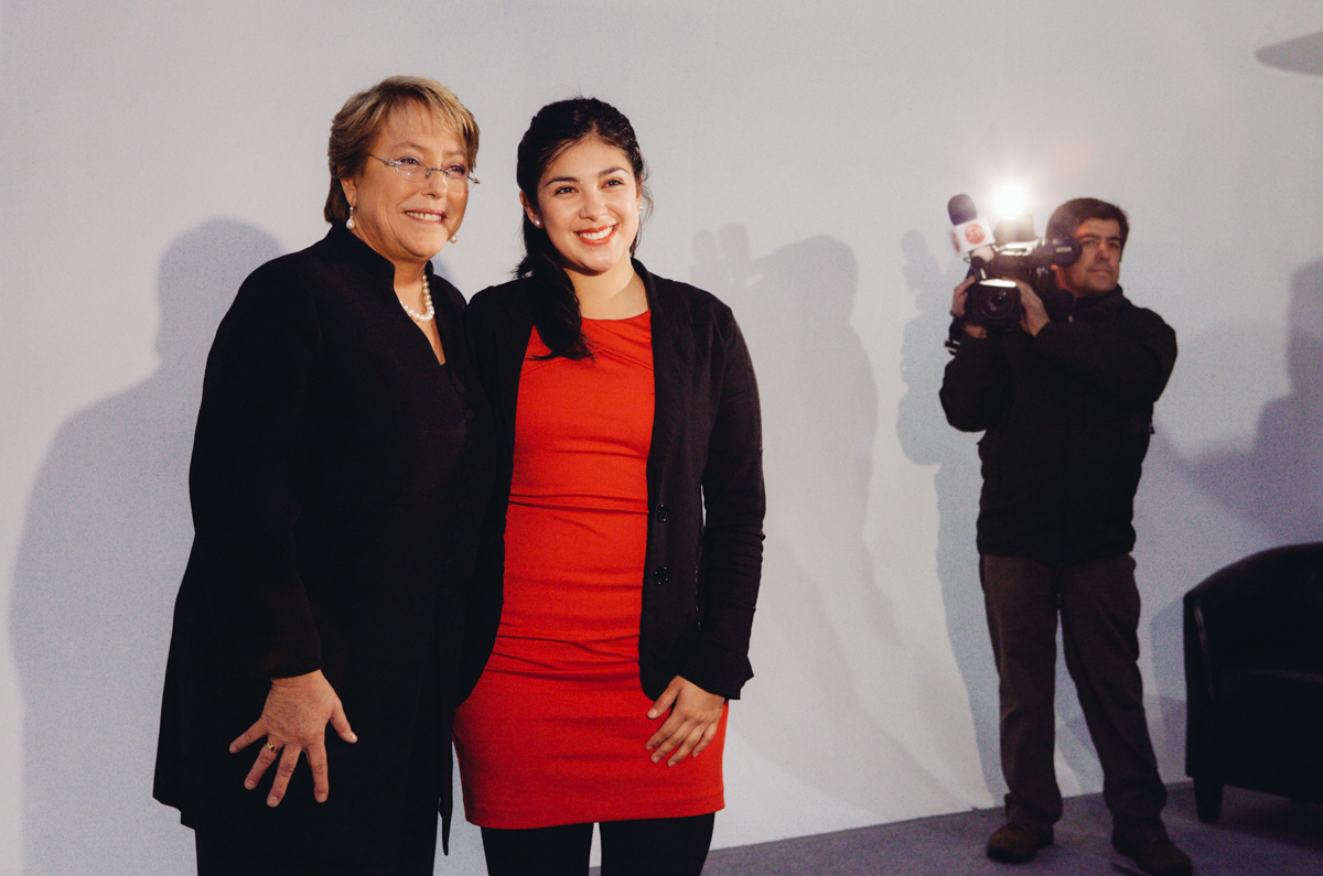 Backstage de la sesión de fotos de los candidatos del pacto Nueva Mayoría: Michelle Bachelet (a presidenta) y Karol Cariola (a diputada por el distrito 19).